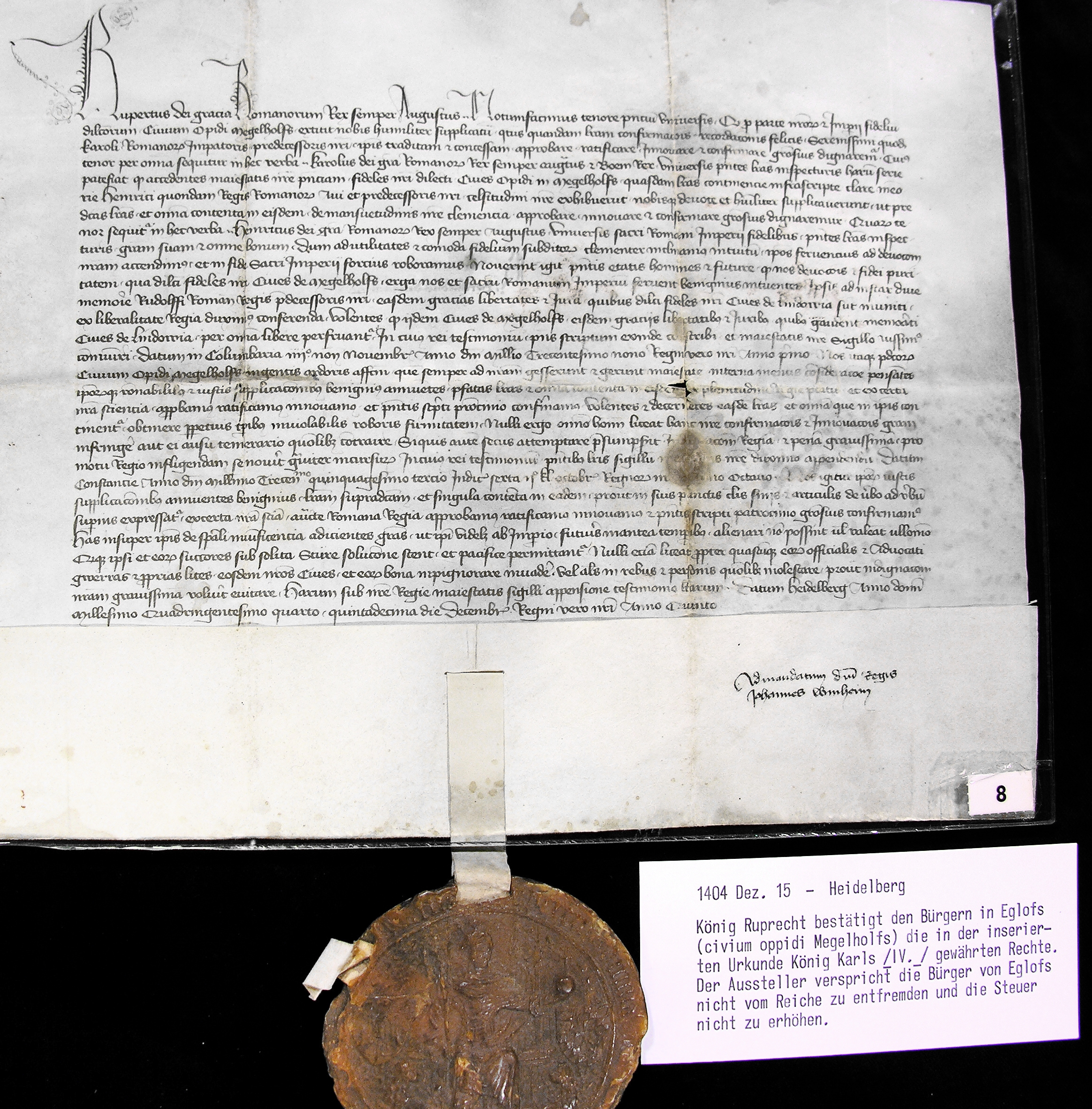 Urkunde von König Rupprecht 1404